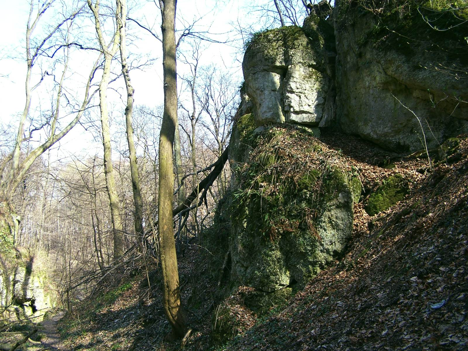 Reserve on nature Panieńskie Skały (Kraków, Las Wolski)